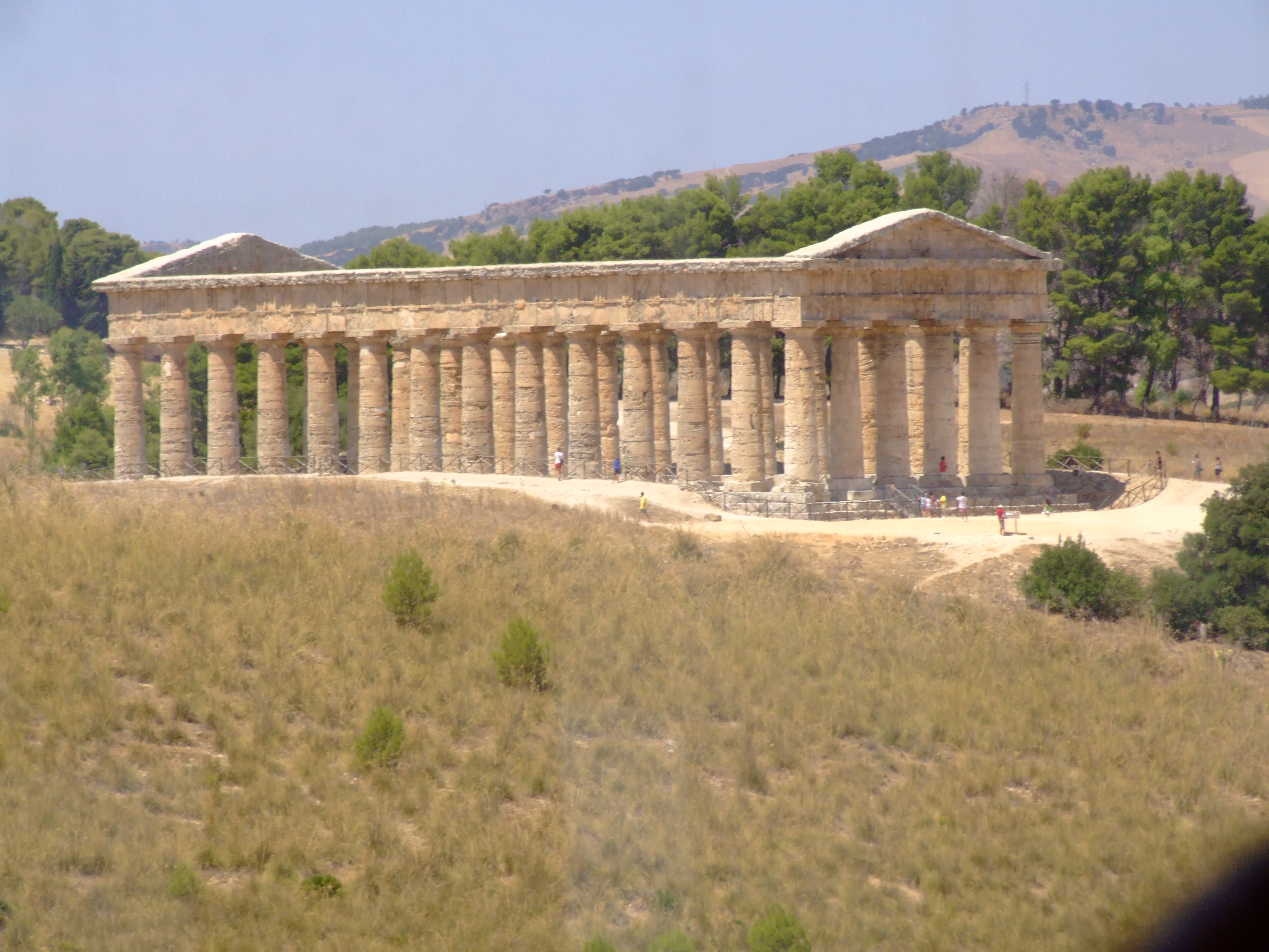 Greek temple at Segesta, Sicily